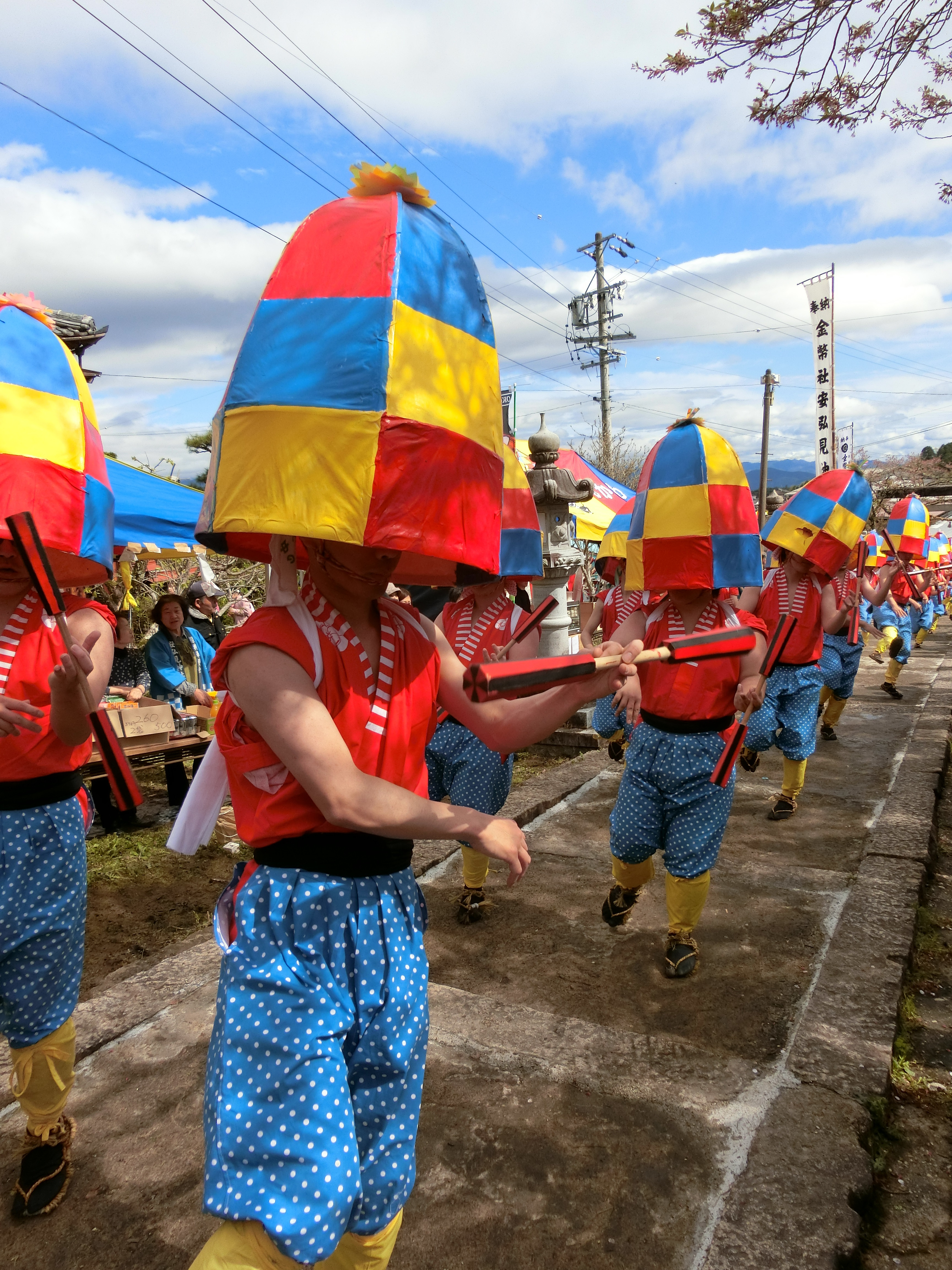 中津川市蛭川町安弘見神社の杵振り踊り